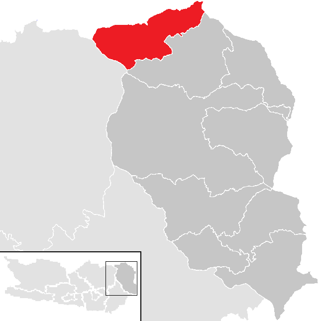 Bezirk Wolfsberg